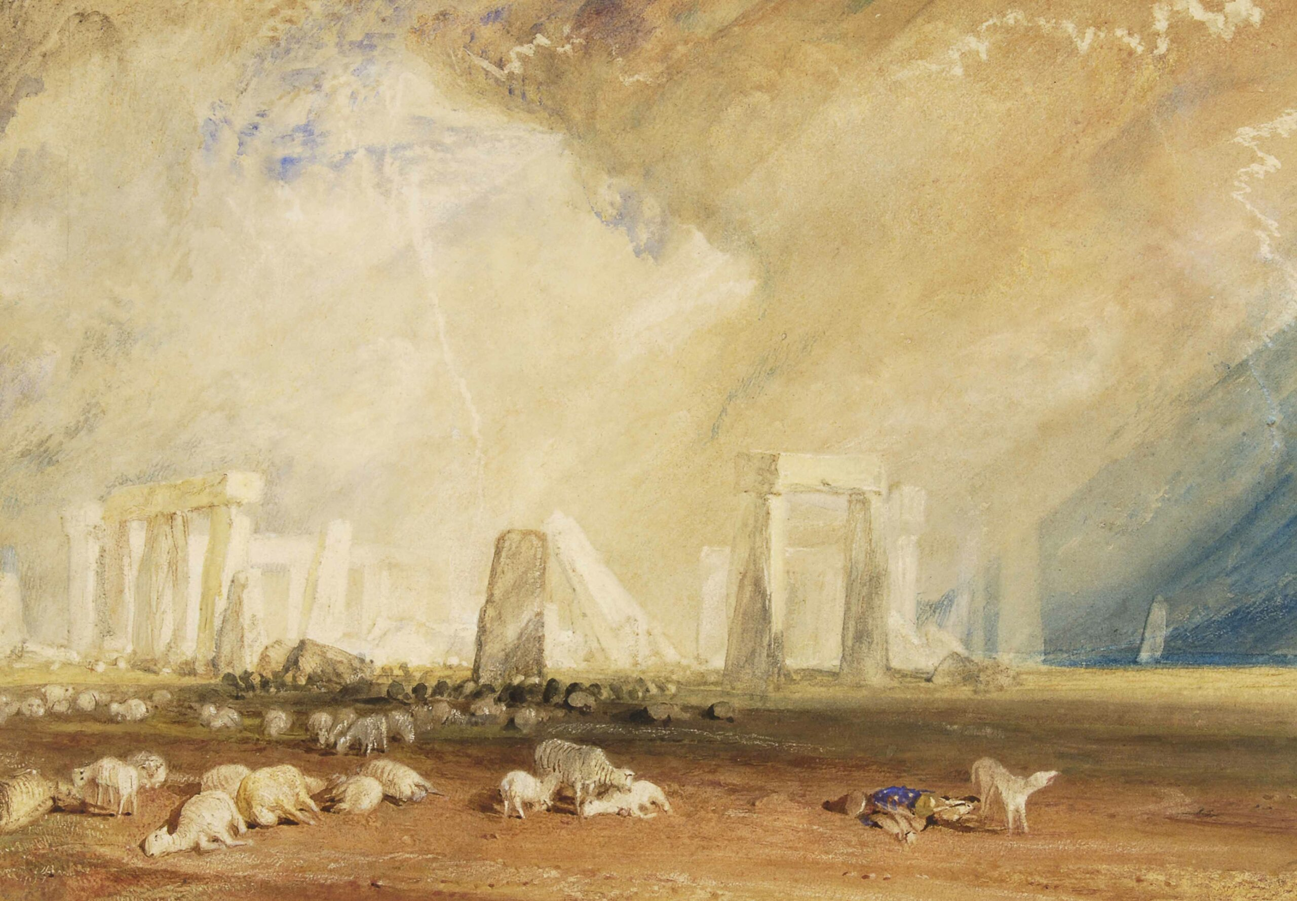 Stonehenge